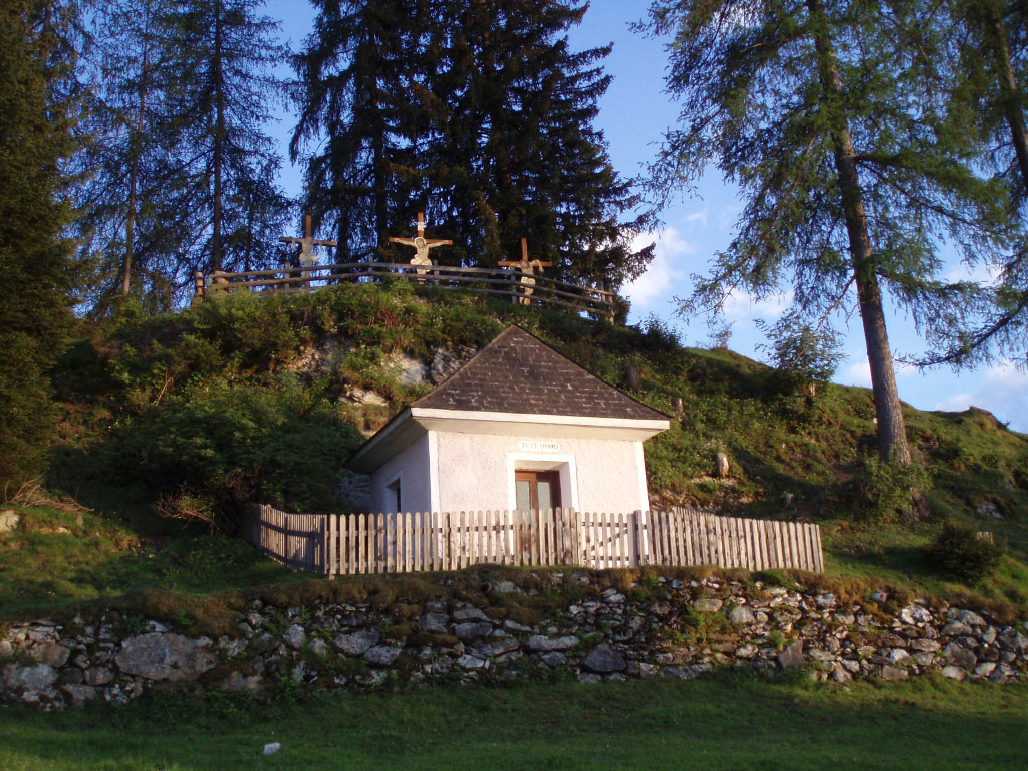 Ölbergkapelle bei Embach